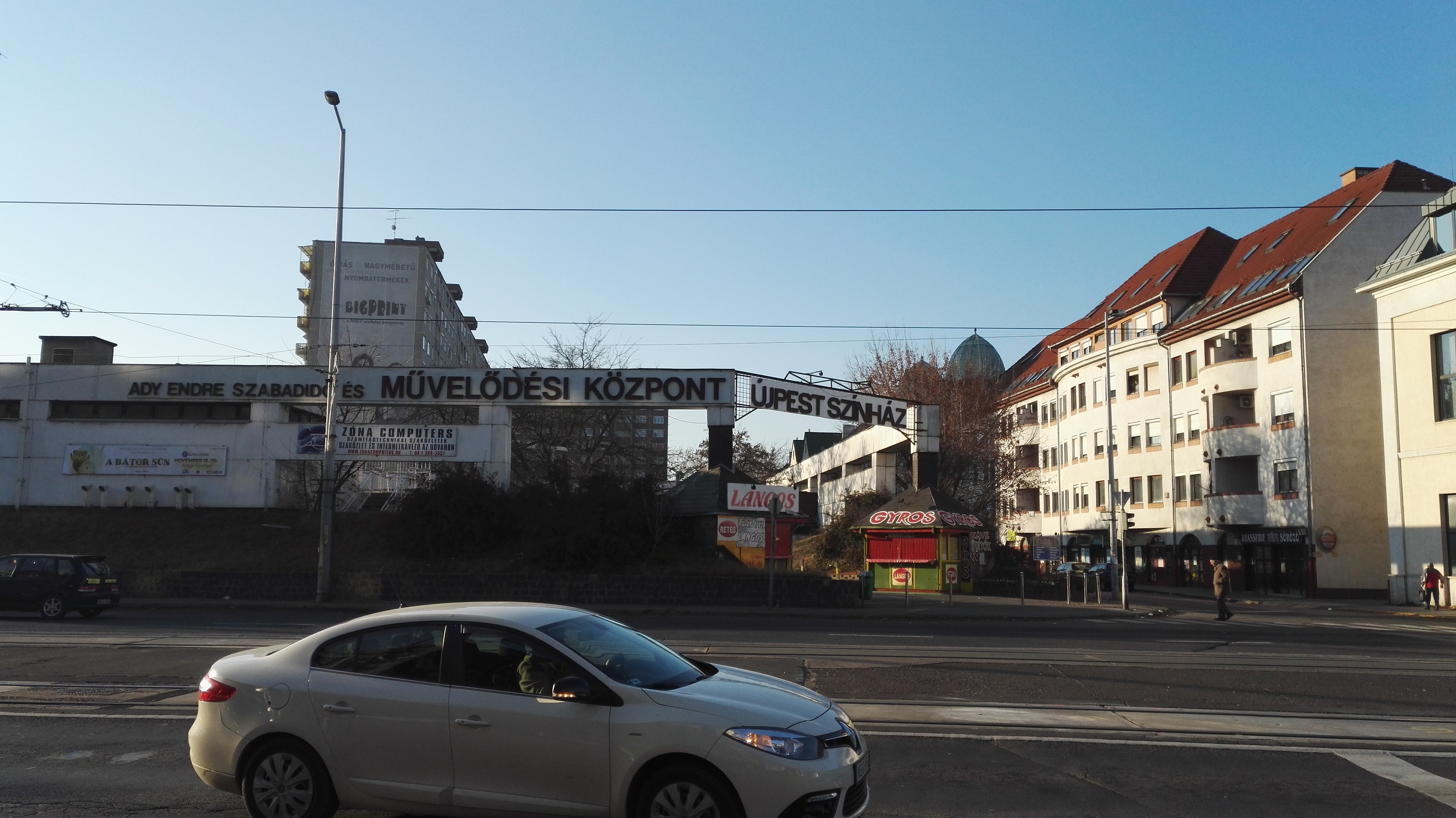 újpest